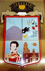 tanhuato mich